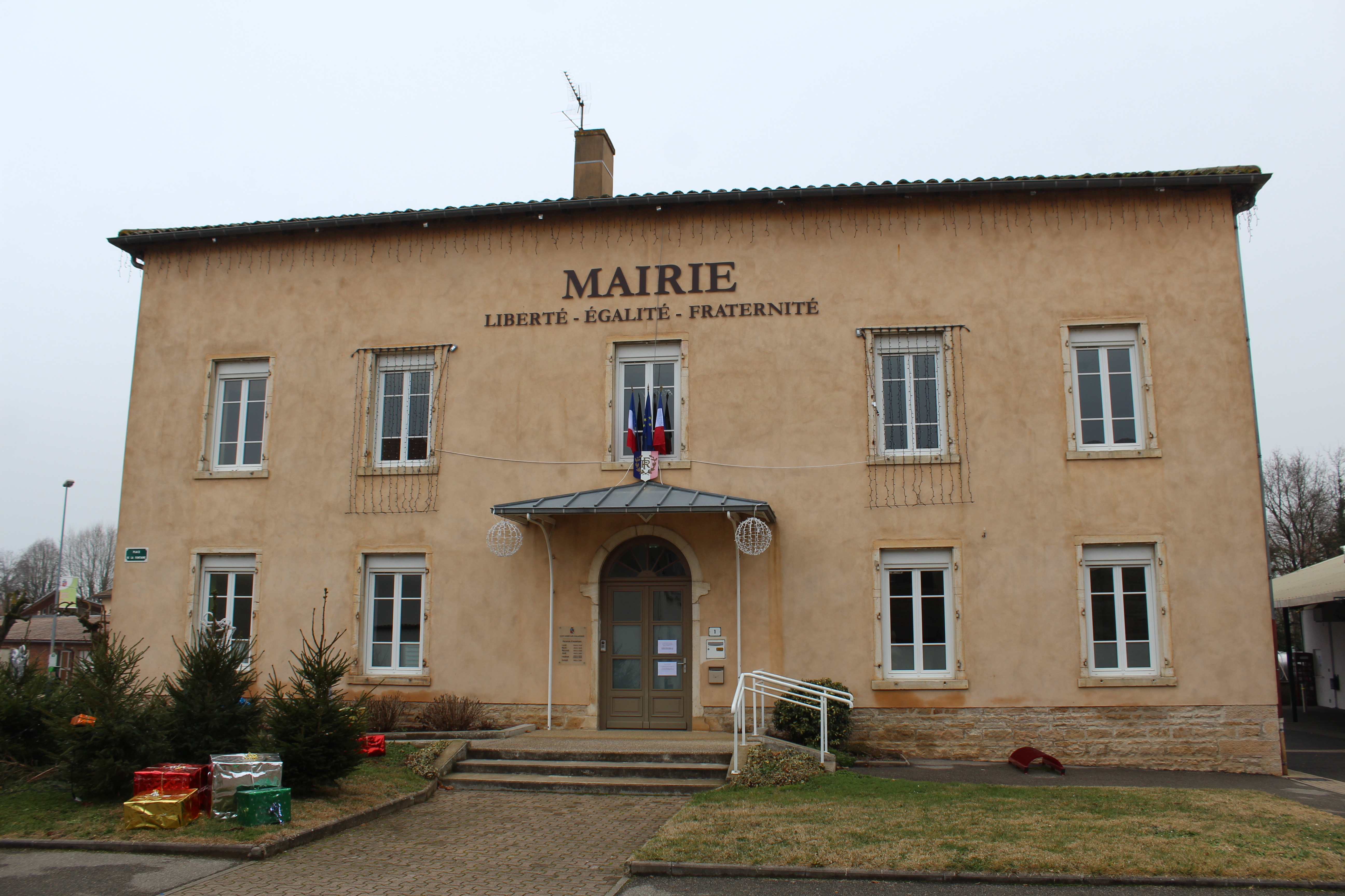 Mairie de Saint-Didier-sur-Chalaronne.